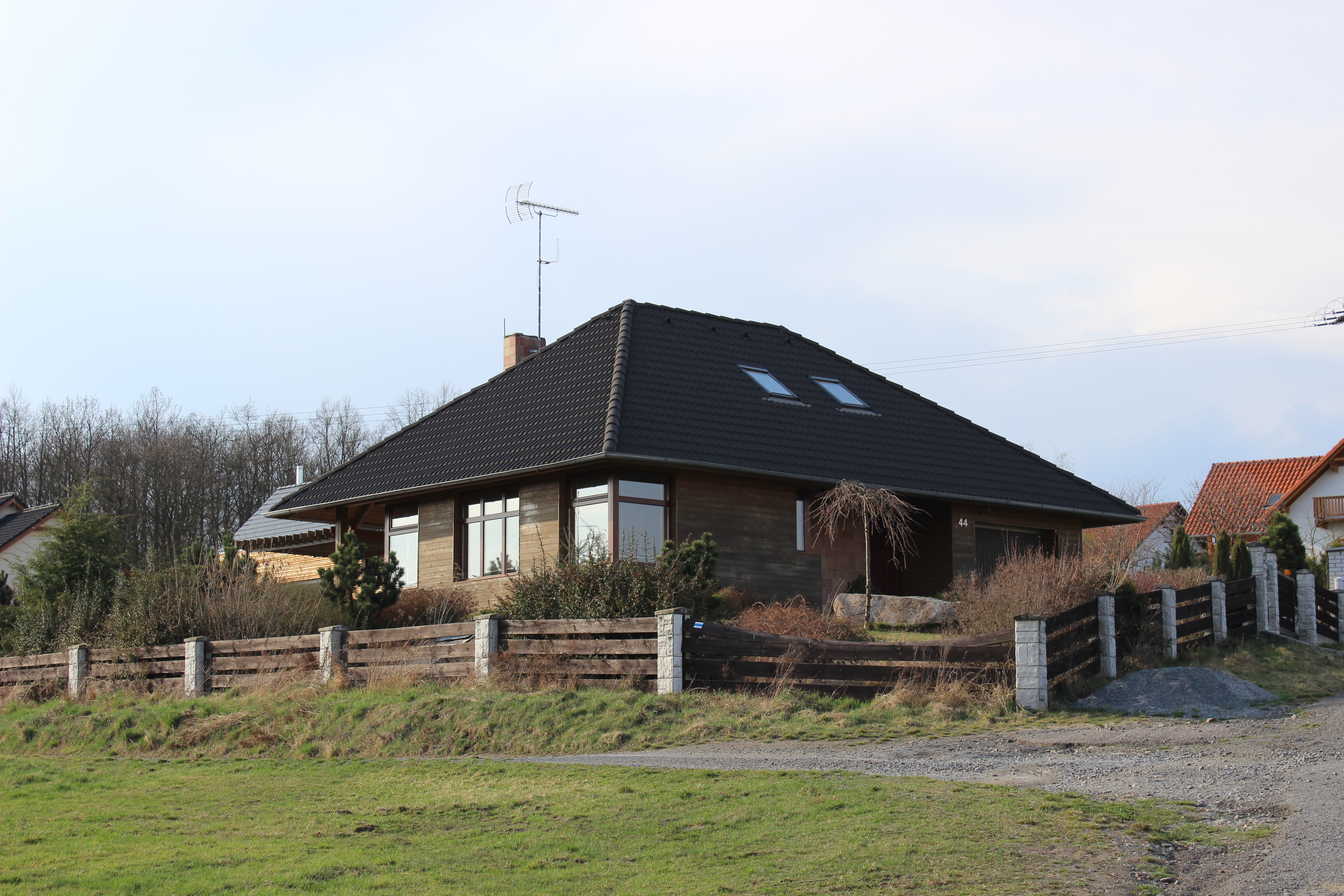 Dům číslo popisné 44 v Nebřichu. This photograph was taken with a Canon EOS 600D.